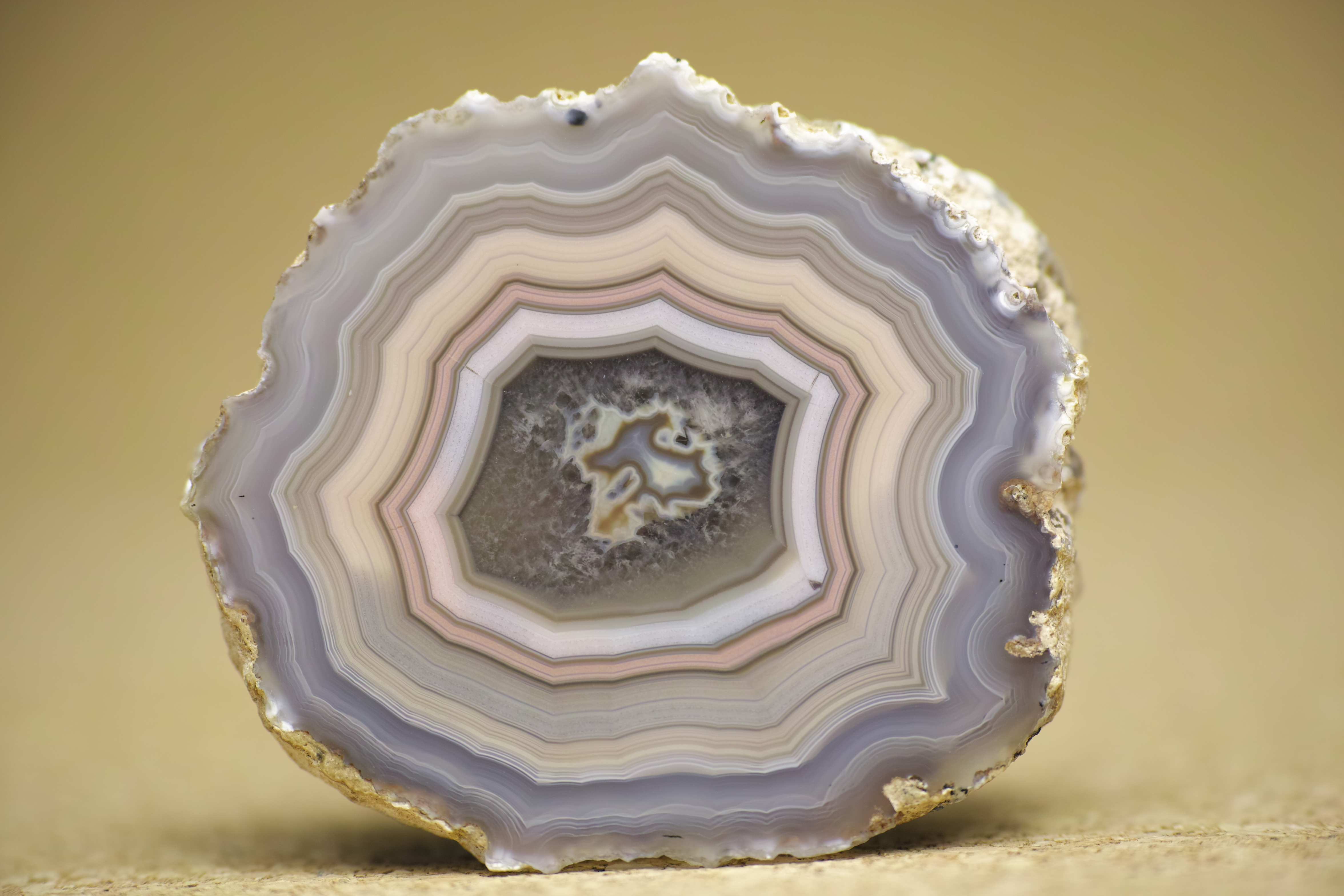 Moctezma Agate from Moctezma, Chihuahua, Mexico